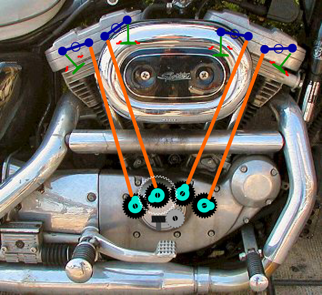 Schéma couleurs du train de soupapes Sportster Evolution superposé à l'image d'un moteur Sportster Evolution. Sortie de vilebrequin (grise); cames (bleu clair); poussoirs / tiges (orange); rockers (bleu foncé); soupapes (vert); sièges de soupapes (rouge).